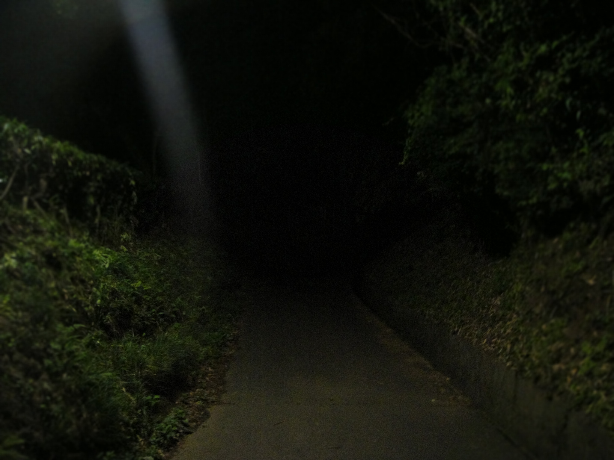 東京都八王子市鑓水の絹の道